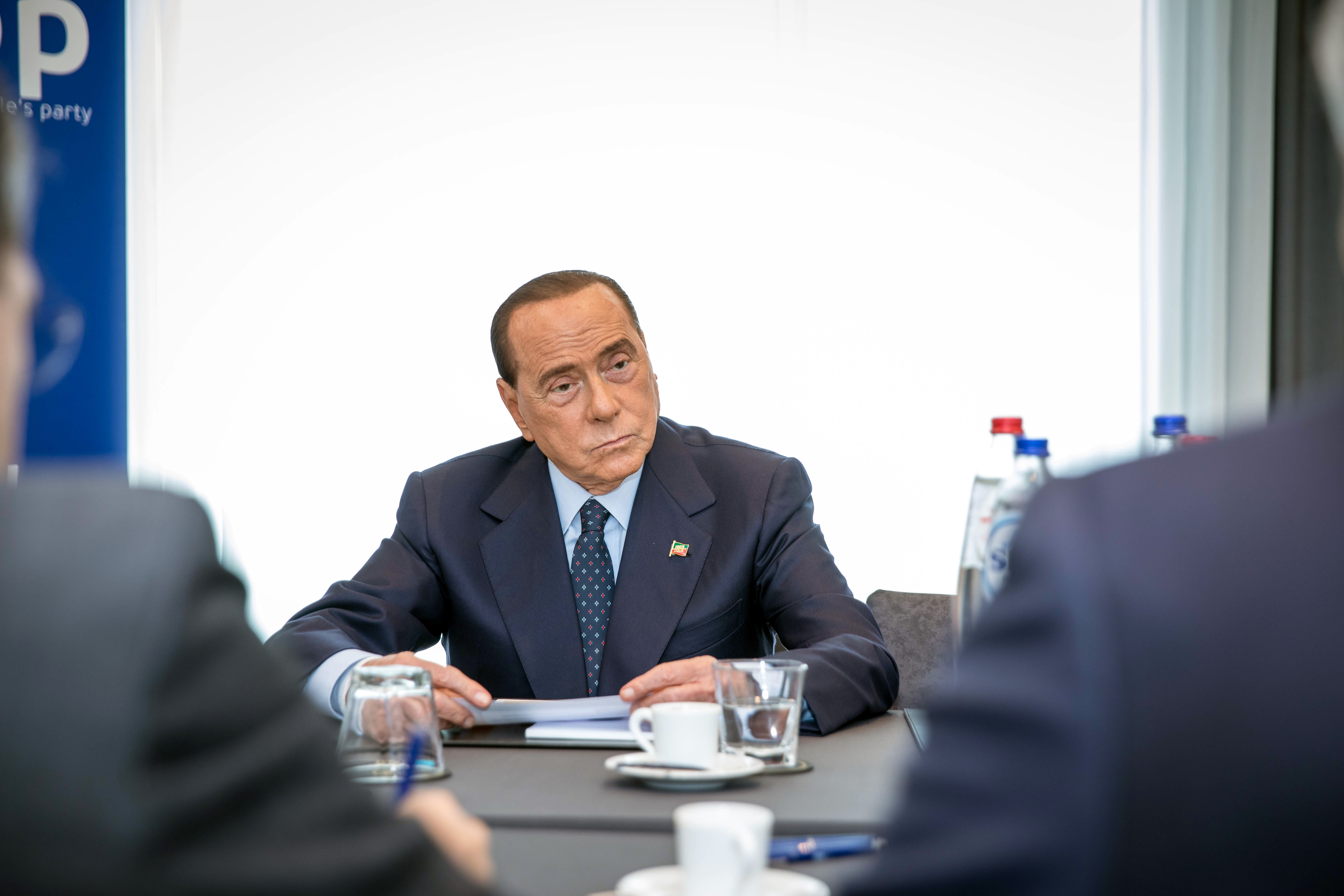 EPP Summit, Brussels, May 2019